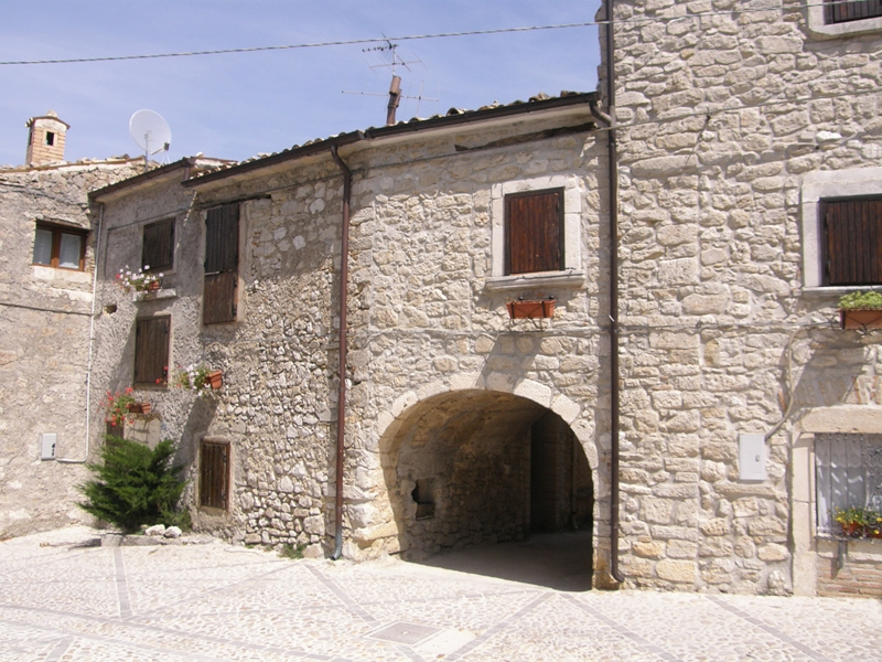 Roccacaramanico